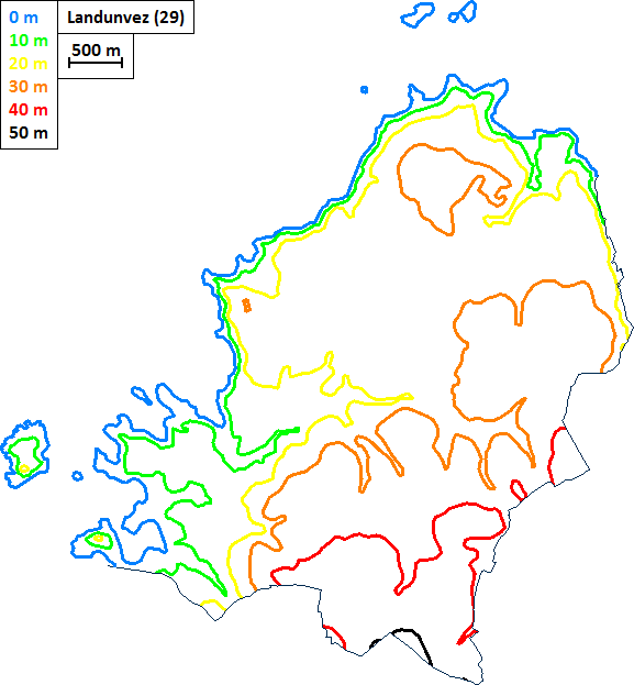 Carte topographique de Landunvez (29)